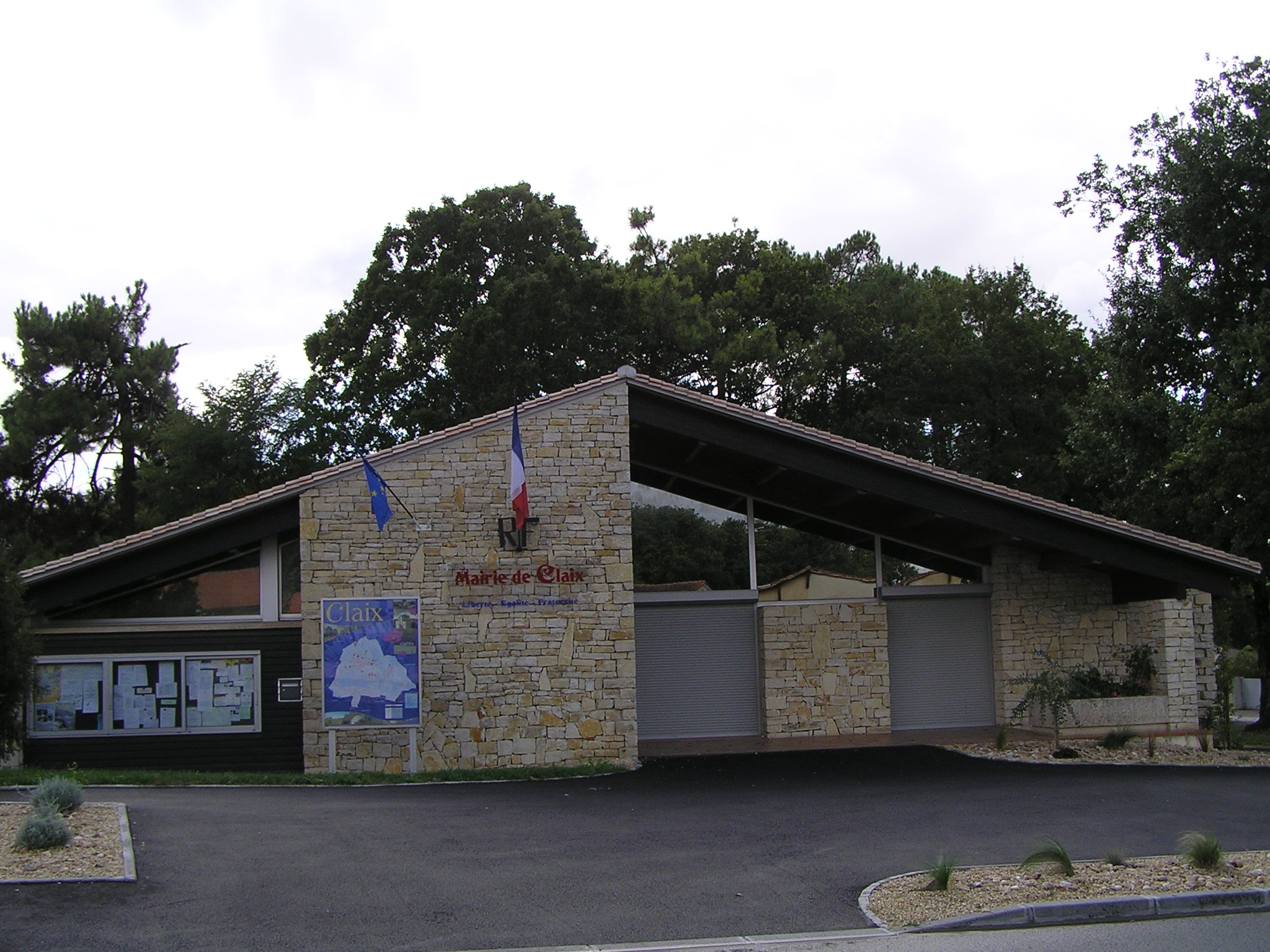 mairie de Claix